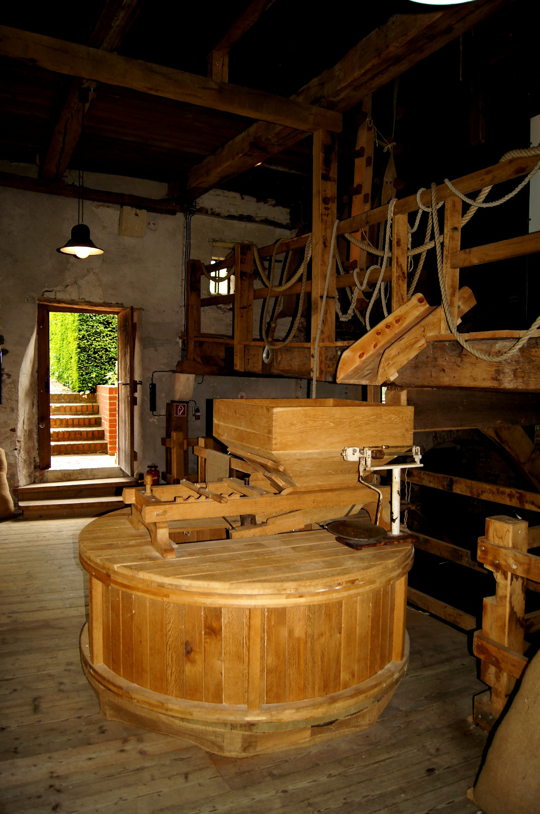 Das Mahlwerk auf dem unteren Zwischenboden der Bischofsmühle in Coesfeld.